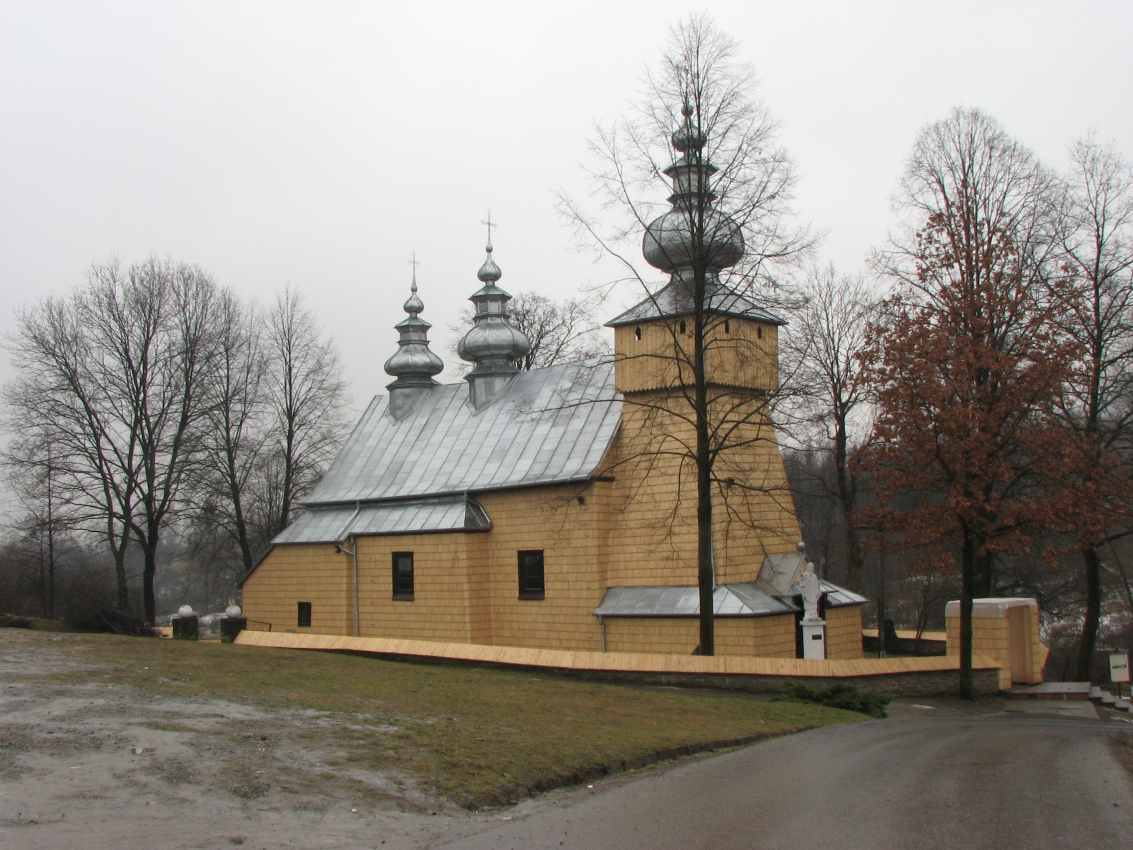 Cerkiew św. Męczennika Dymitra (obecnie kościół parafialny św. Stanisława Biskupa) w Binczarowej.